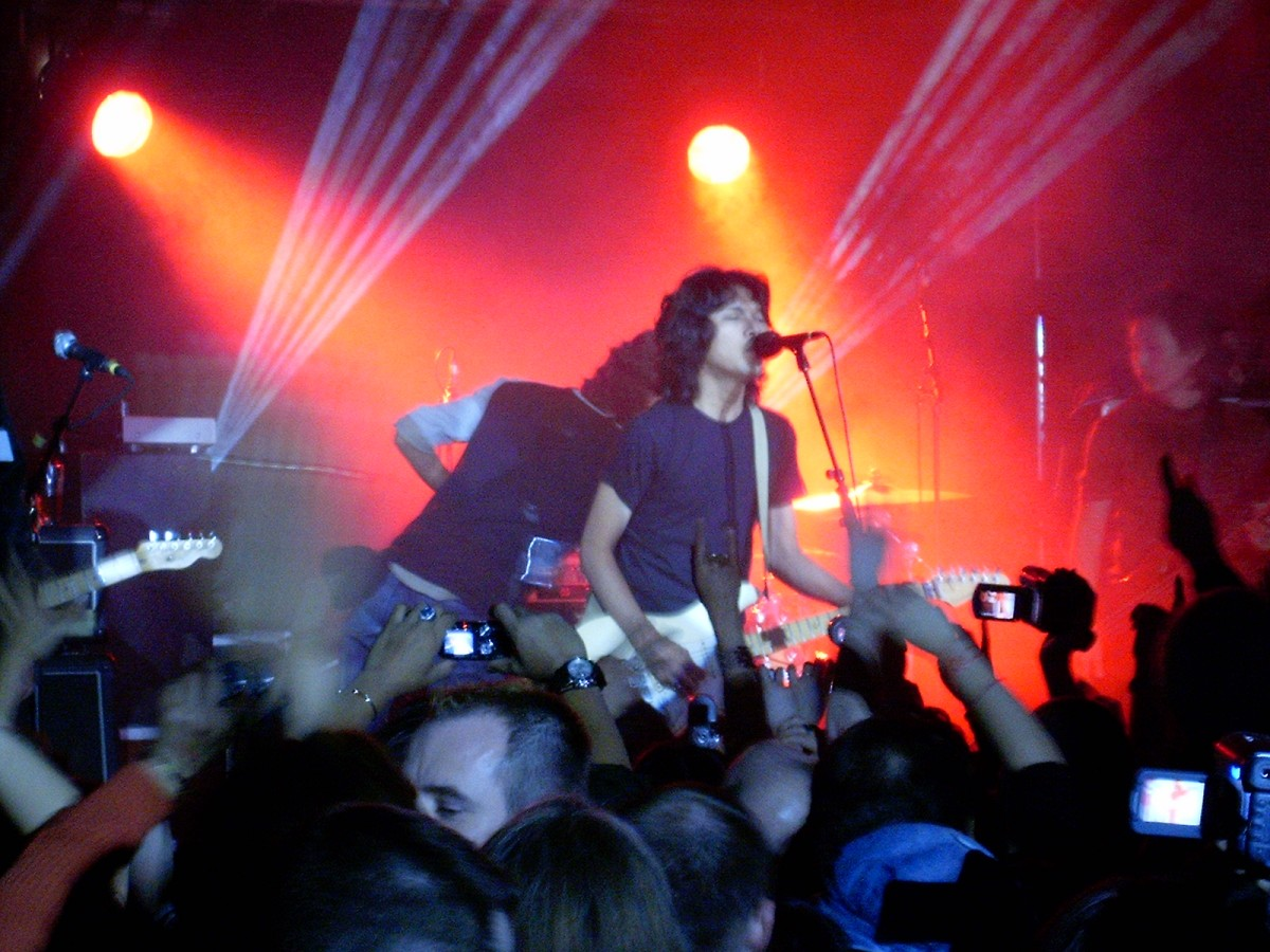 LOSO concert at 2005-01-29 in Mannheim/Germany (Rüya-Mehrzweckhalle, Eisenbahnstr. 22, Mannheim-Neckarau)